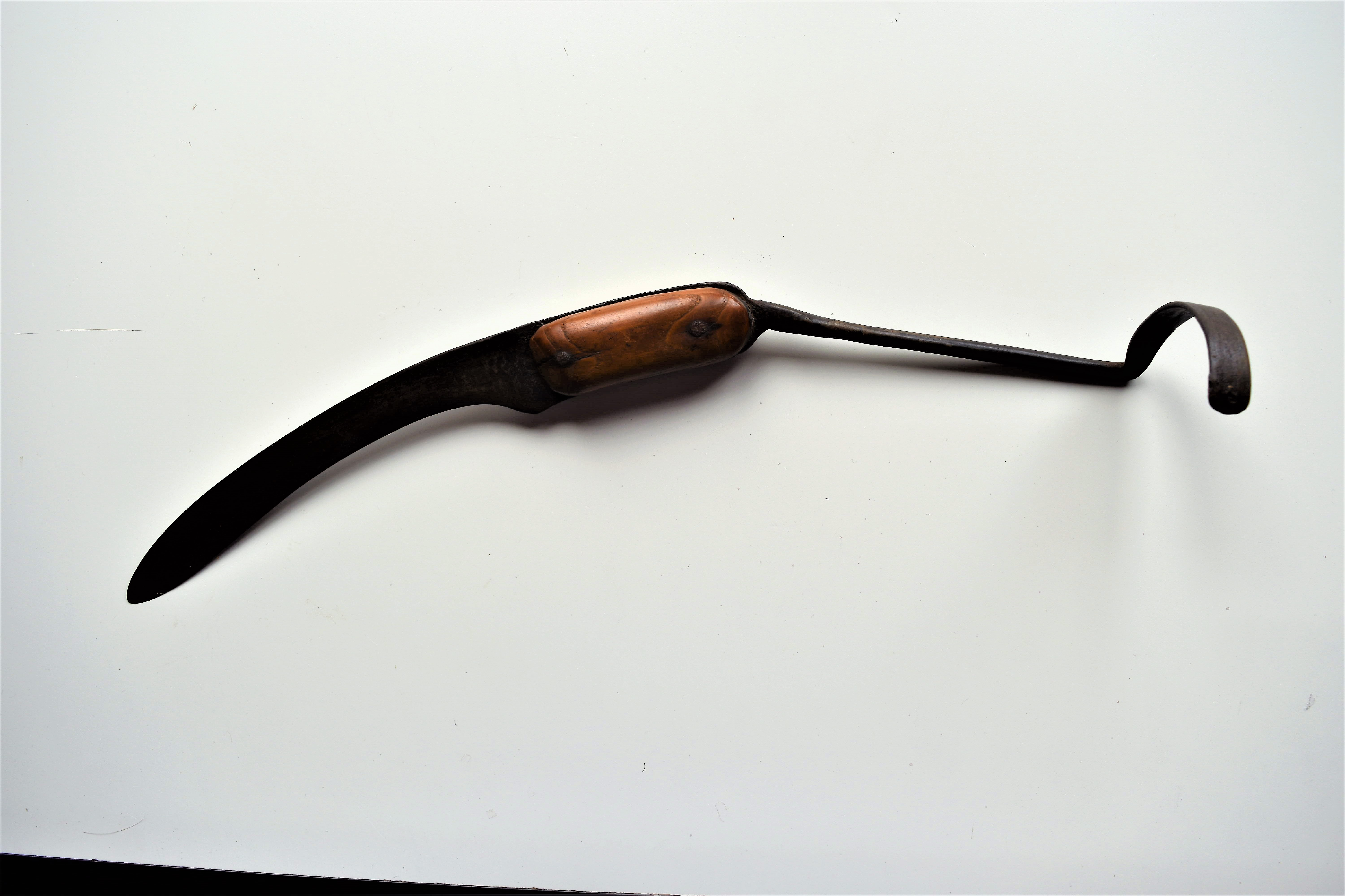 Bij het ontstaan van het broodmes werd dit door de plaatselijke smid opvraag en op maat gemaakt. Lemmet 22 cm., heft 12 cm. en armsteun 20 cm. waren gemiddelde maten. Armsteun dient om rond de arm te leggen en zo meer druk te kunnen uitoefenen bij het snijden van de zelfgebakken broden. Vooraleer het ronde brood aan te snijden werd door de huisvrouw met het mes een kruisteken gemaakt op de onderkant van het brood. Het was ook de gewoonte om eerst boter te smeren en dan pas de boterham af te snijden en te geven aan de vader, heer des huizes, vervolgens werden kinderen en ten slotte moeder bediend.